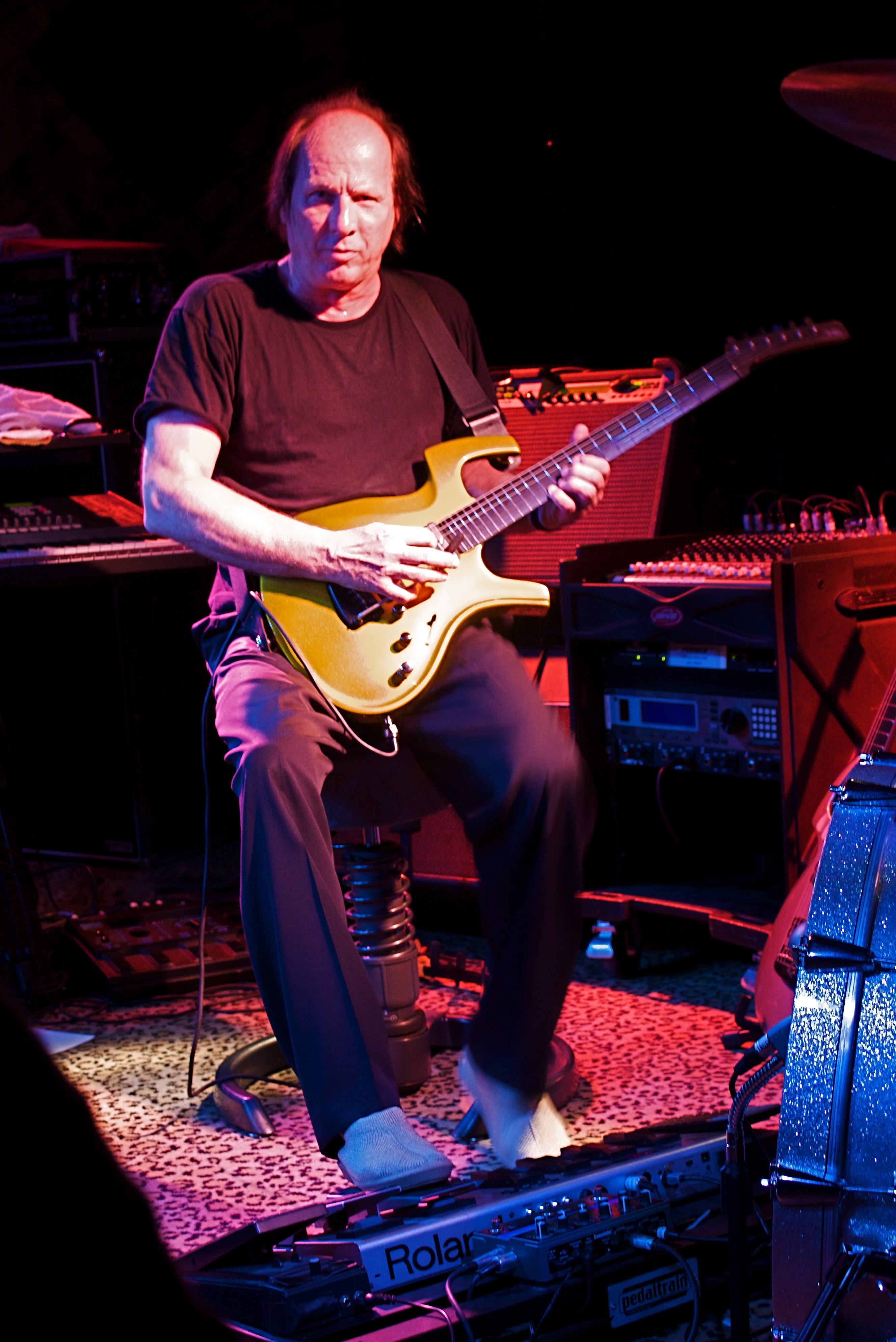 Adrian Belew